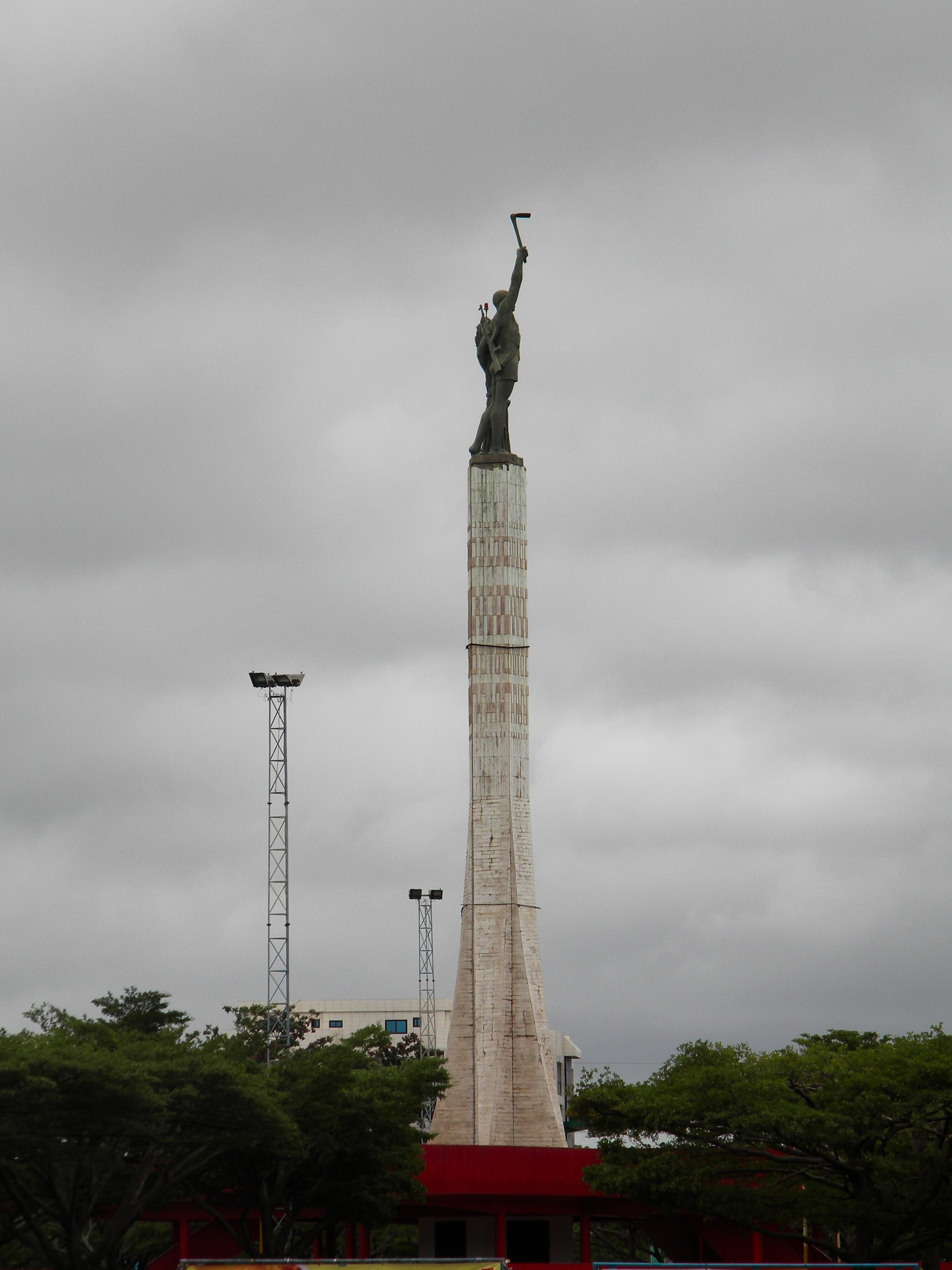 Place de l'Étoile rouge Wikidata has entry Q25384162 with data related to this item.